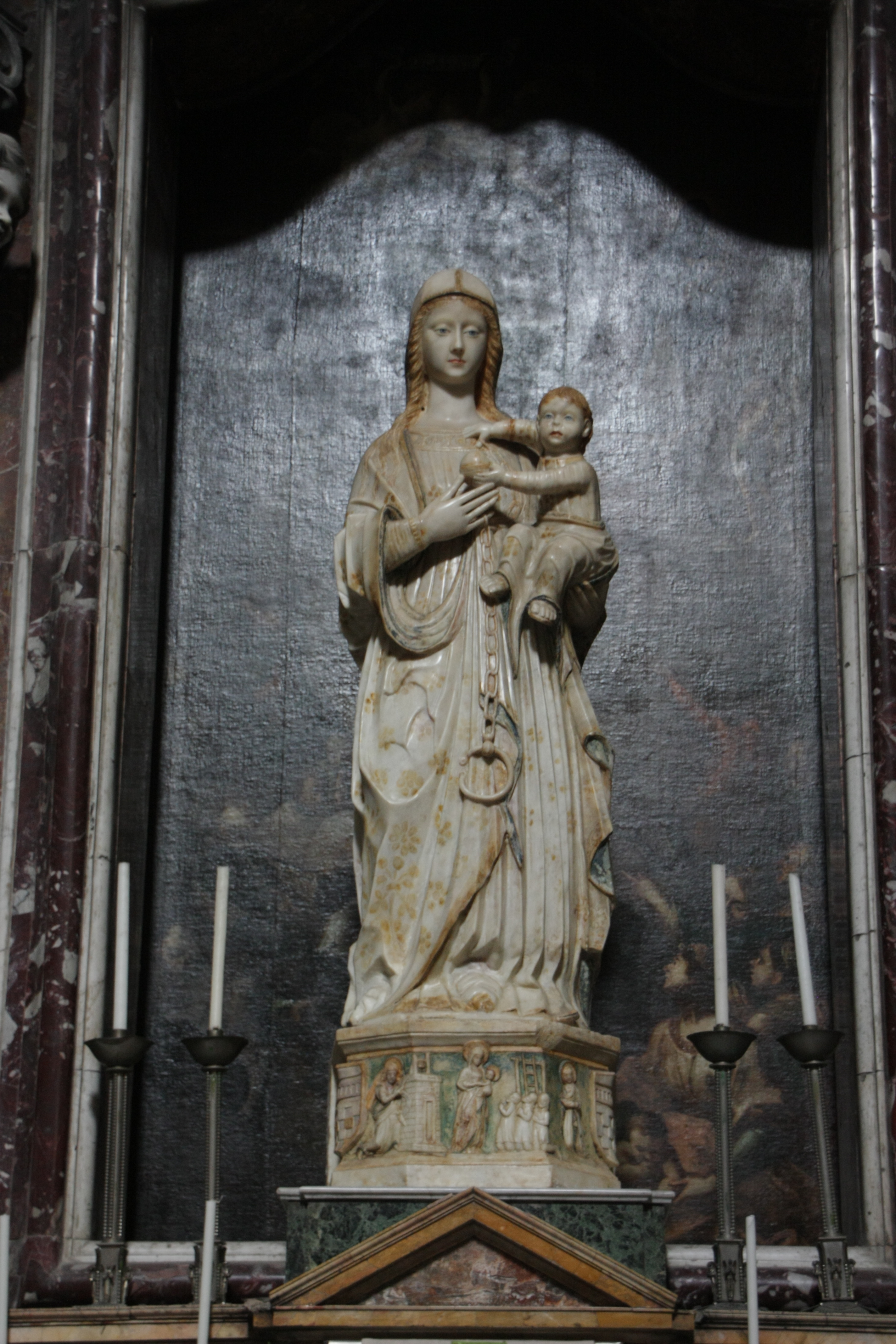 Santa Maria la Cava e Sant'Alfio (Lentini)